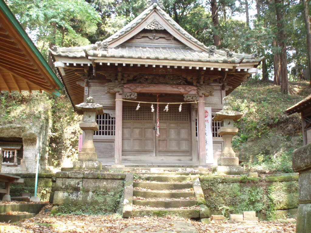 Kumano shrines, City of Kamakura, Pref. Kanagawa.